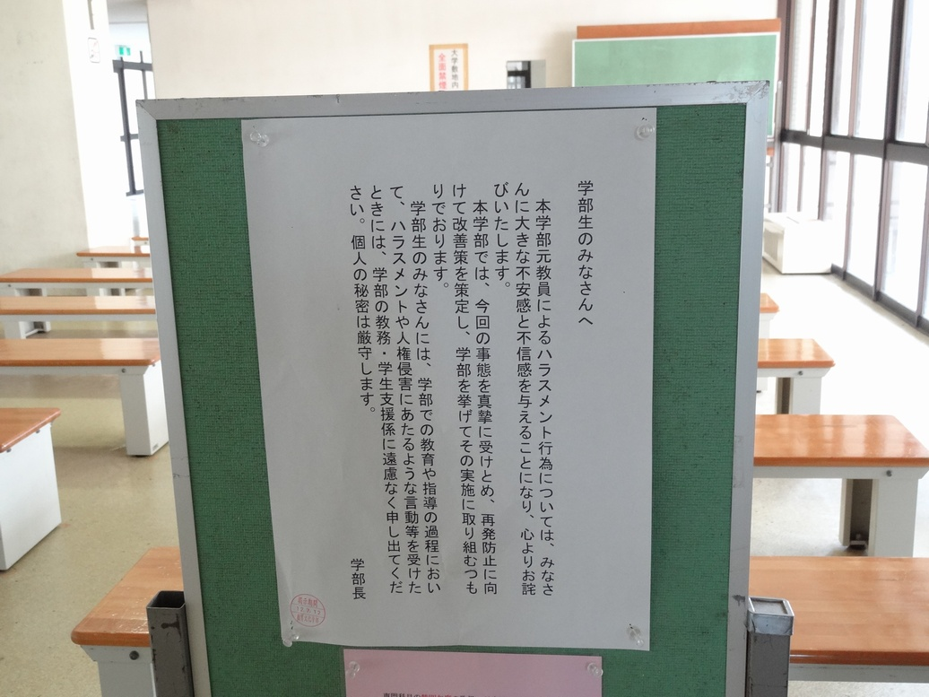 宮崎大学教育文化学部長が2012年6月に公表したセクハラ案件を受けて、同年7月12日に学部生向けに宛てた声明。